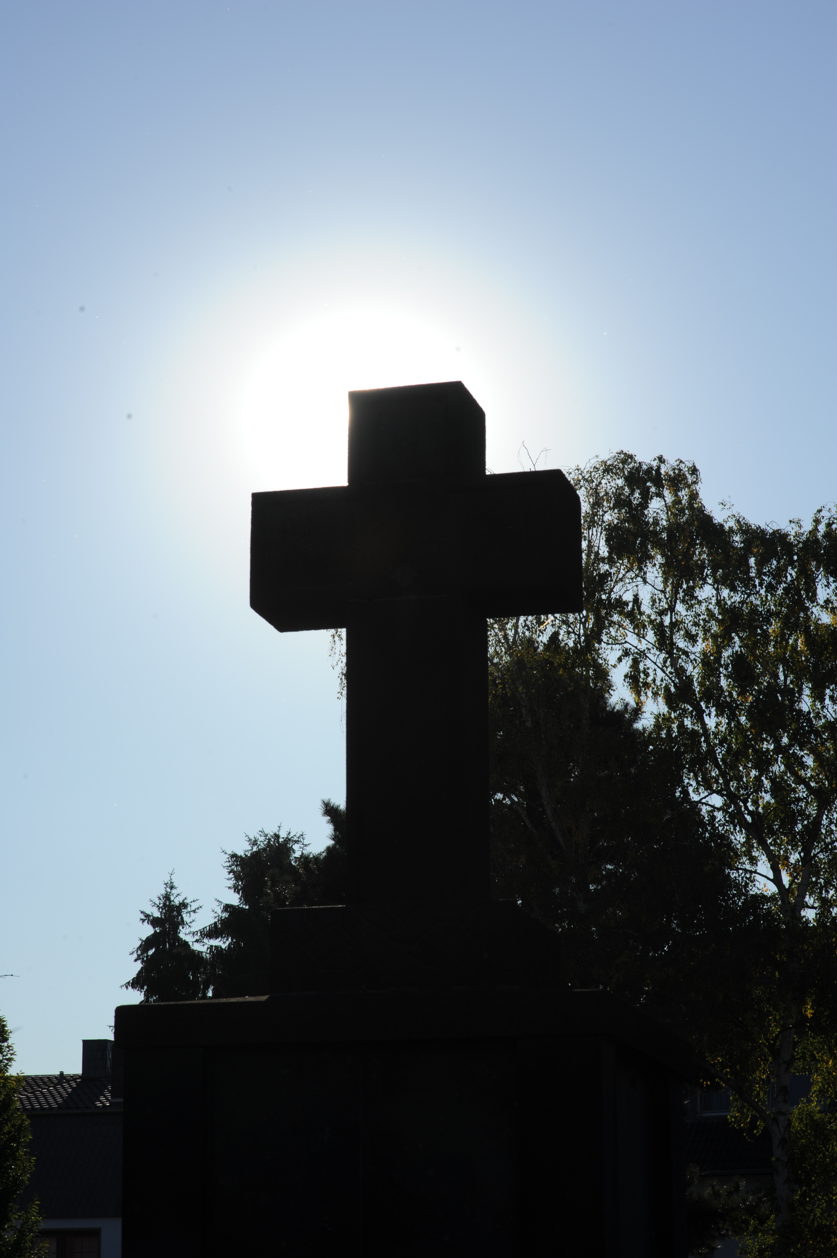 Köln, Friedhof Trenkebergstraße Kriegerehrenmal